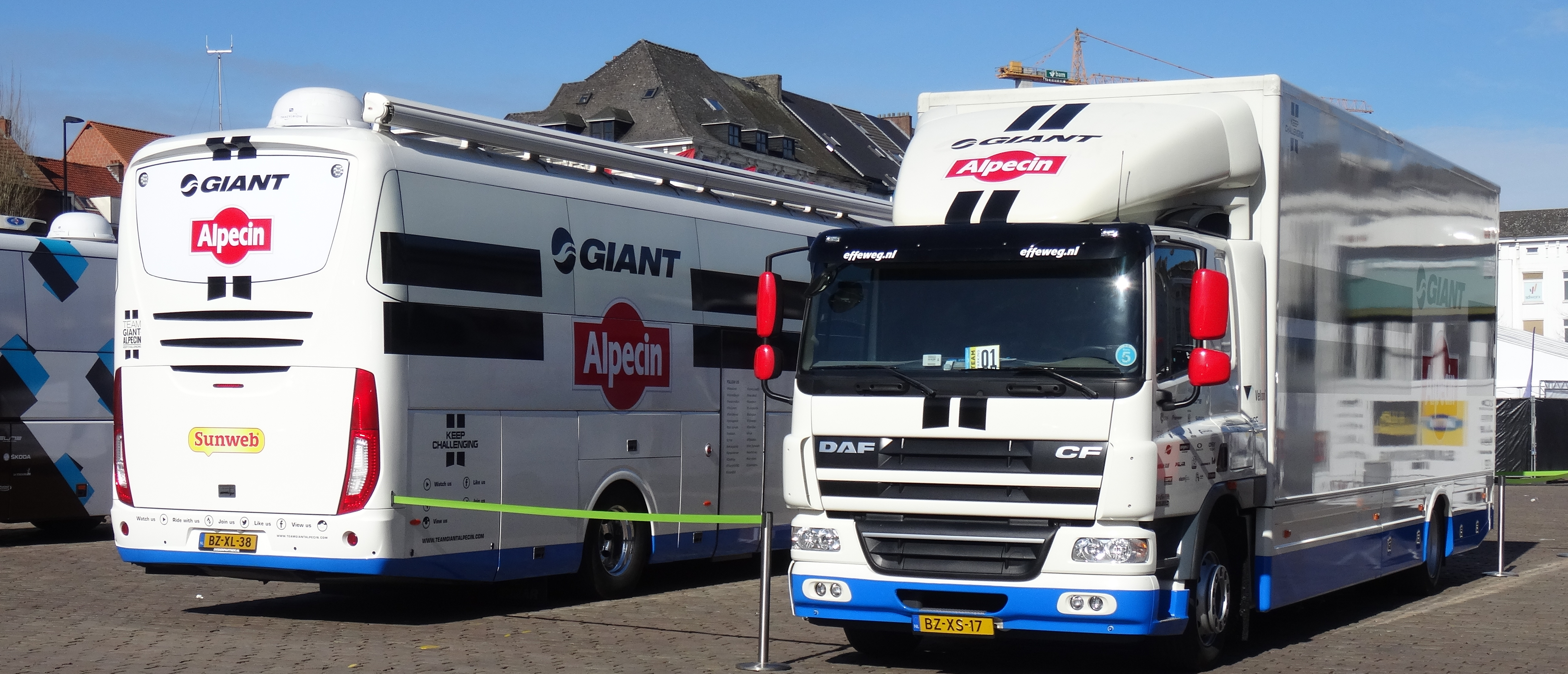 Reportage réalisé le samedi 28 février à l'occasion du départ et de l'arrivée du Circuit Het Nieuwsblad 2015 à Gand, Belgique.